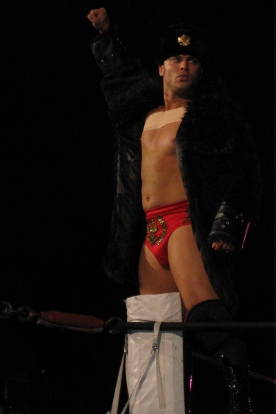 2014年9月21日 神戸ワールド記念ホール 「DESTRUCTION in KOBE」 アレックス・コズロフ